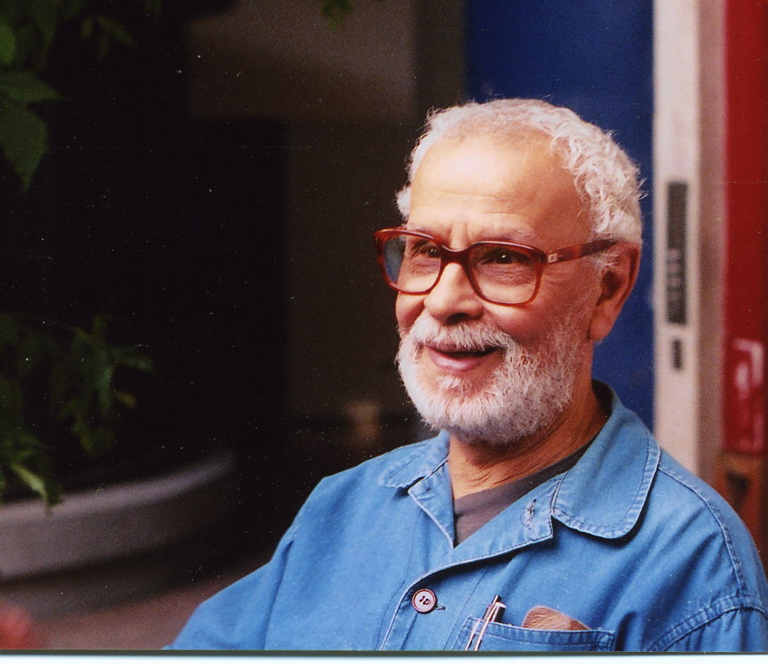 le peintre algérien Mohamed Aksouh